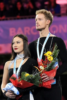 Мэдисон Чок и Эван Бейтс (США) на финале Гран-при по фигурному катанию 2014-2015.